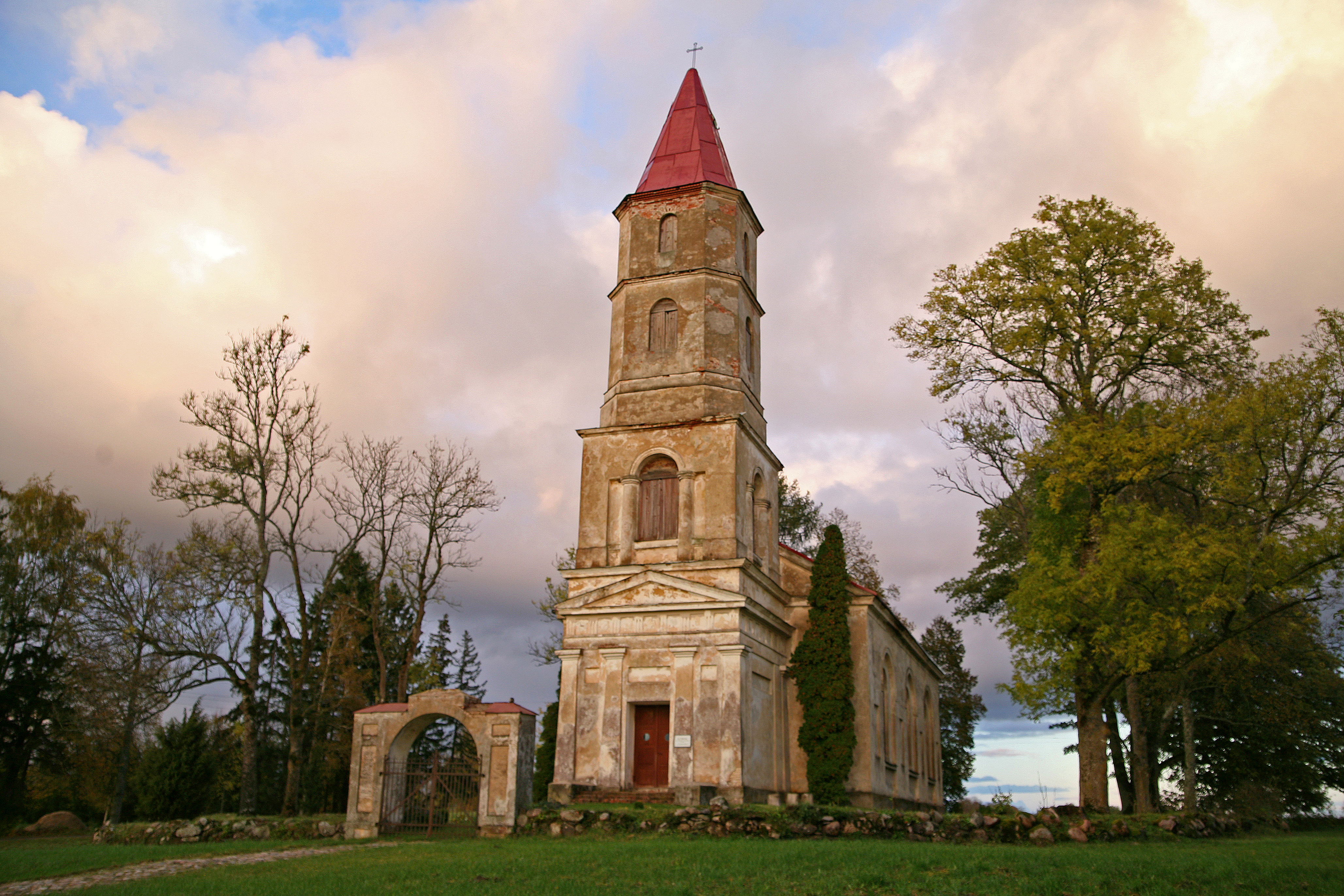 Lutriņu evaņģēliski luteriskā baznīca